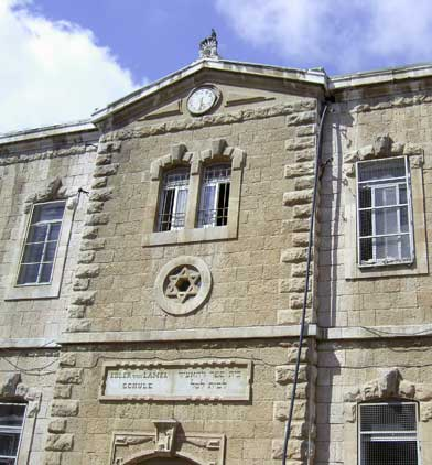 מגן דוד בירושלים Jerusalem